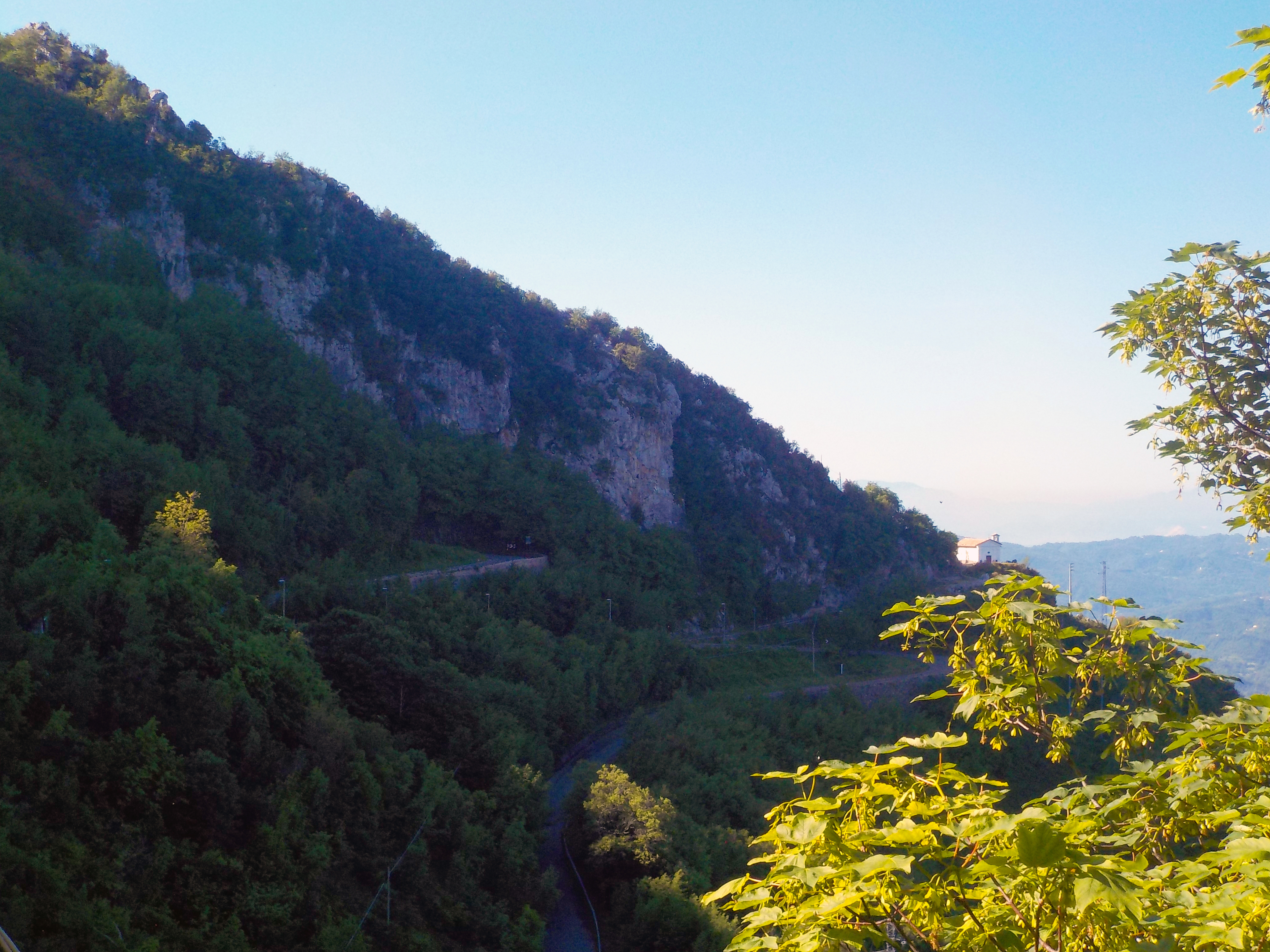 parco naturale regionale Monti Simbruini (Q3895675)